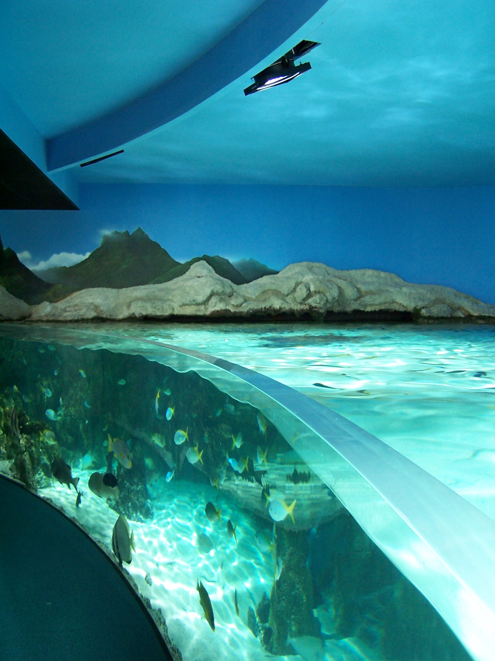 Photographie des bassins de l'Aquarium de La Rochelle.